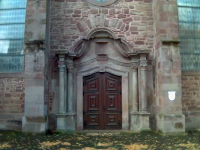 Portal der kath. Sankt Peter und Paul Kirche zu Lindau.